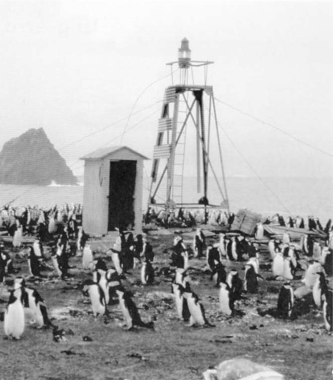 Baliza luminosa de Punta Hewison con pingüinos en 1976. Isla Thule, Sandwich del Sur.